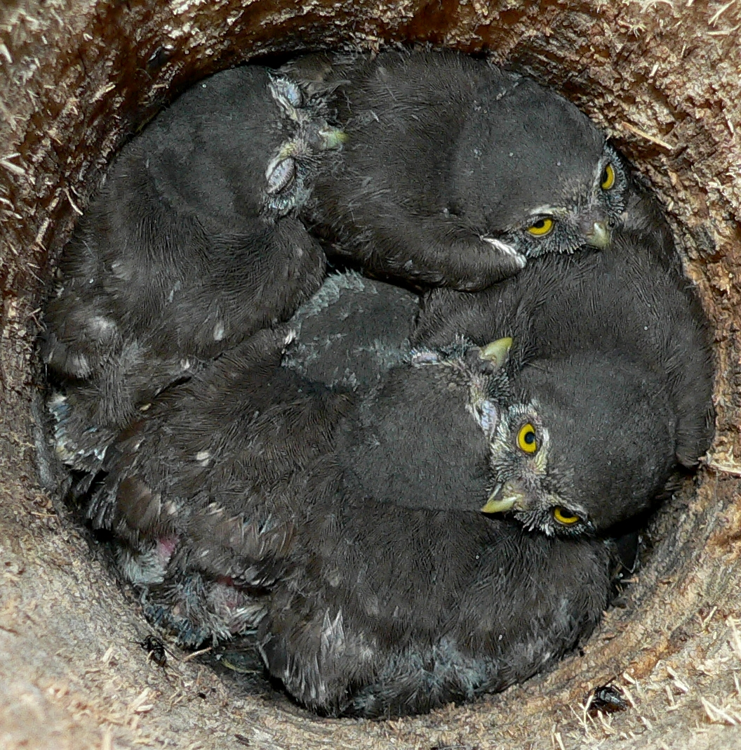 Pygmy owl (Glaucidium passerinum), chicken in nest box; Kauhava, western Finland